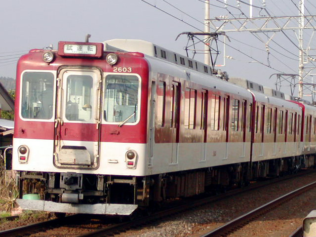 近鉄 2600系